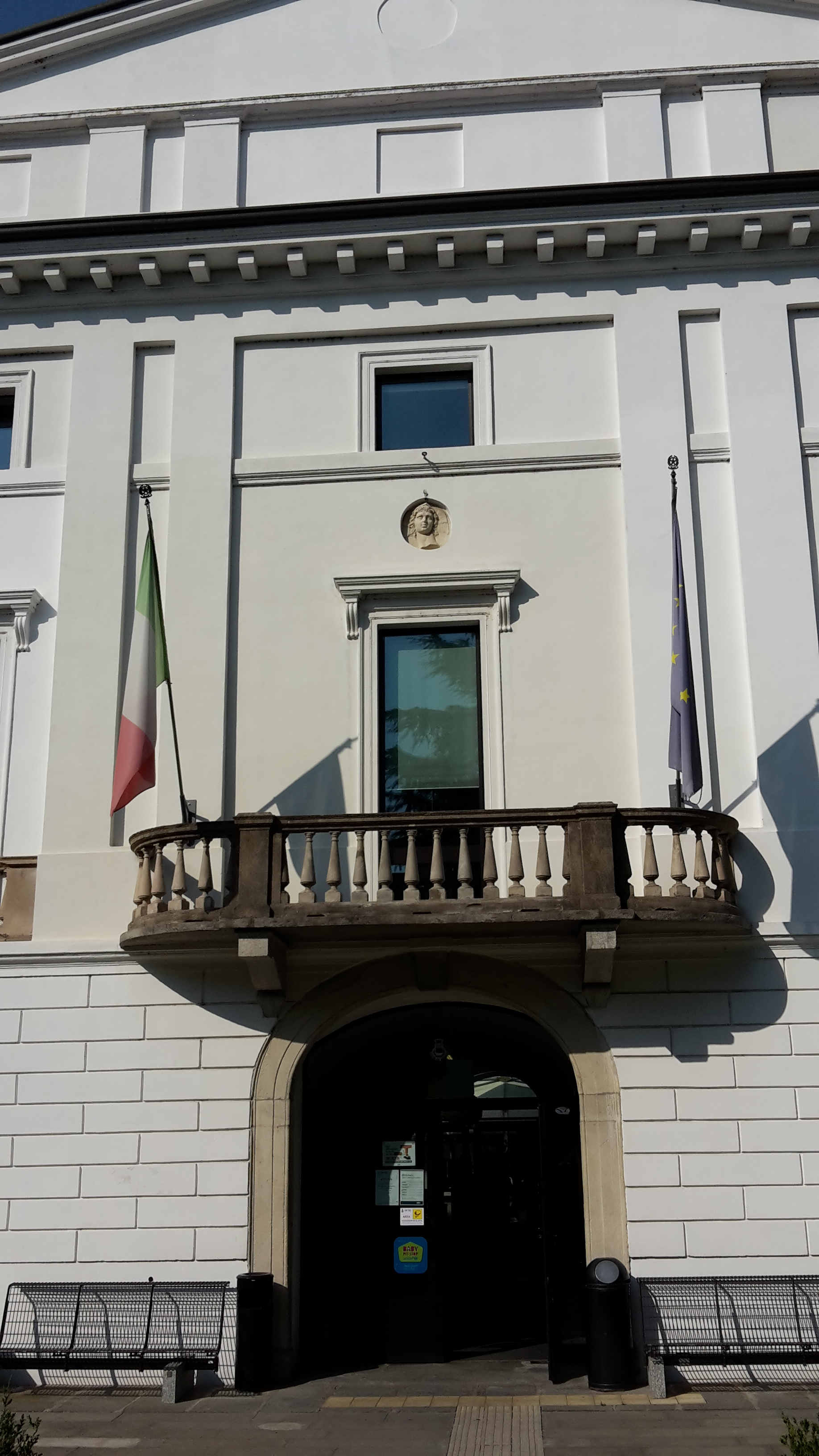 Вилла семьи Гуерринони в Сериате, парадный вход